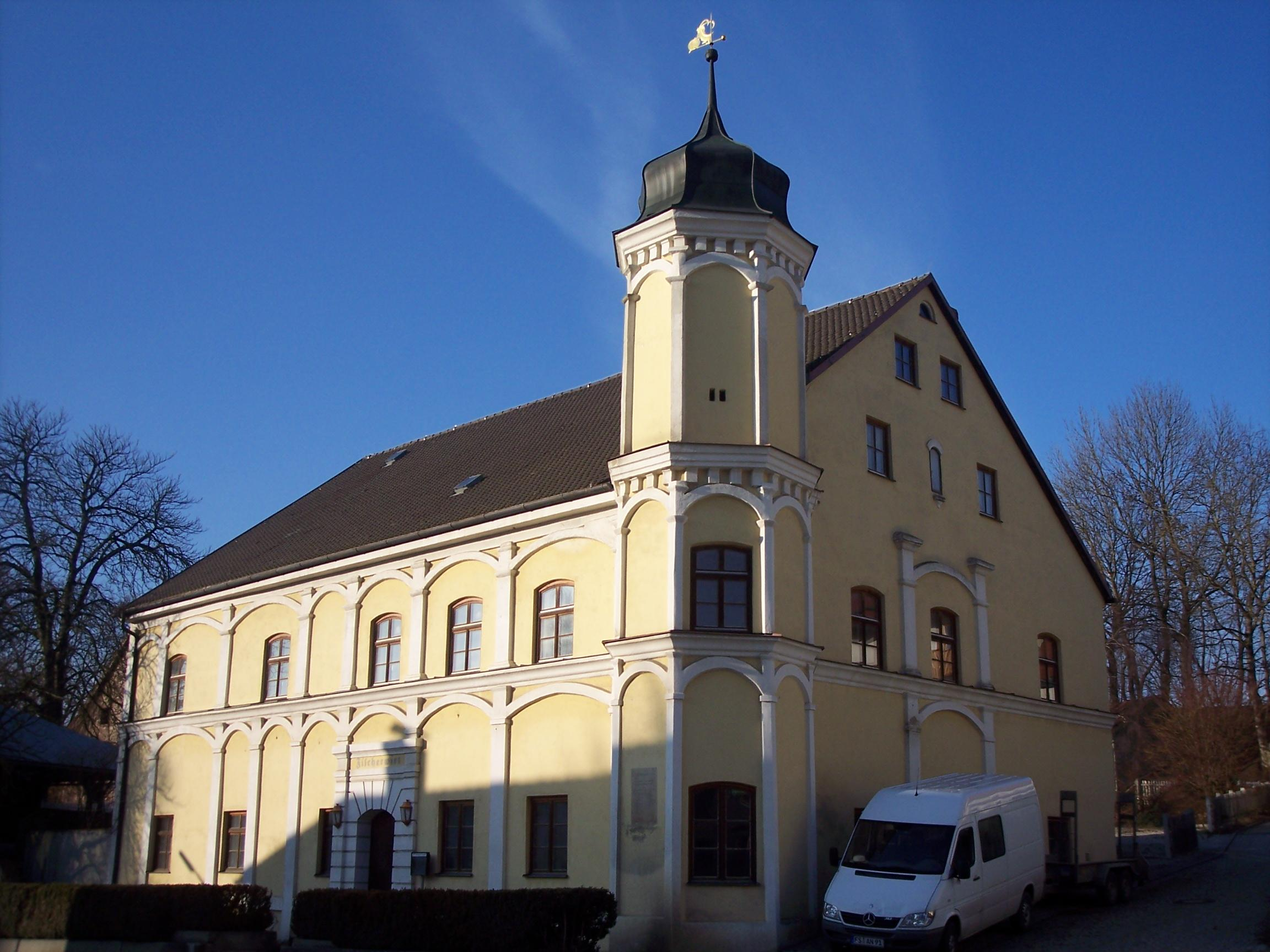 Fischerwirt in Kranzberg, Lkr. Freising, Bayern, Deutschland, ehemals Gebäude des Pfleggerichts Kranzberg